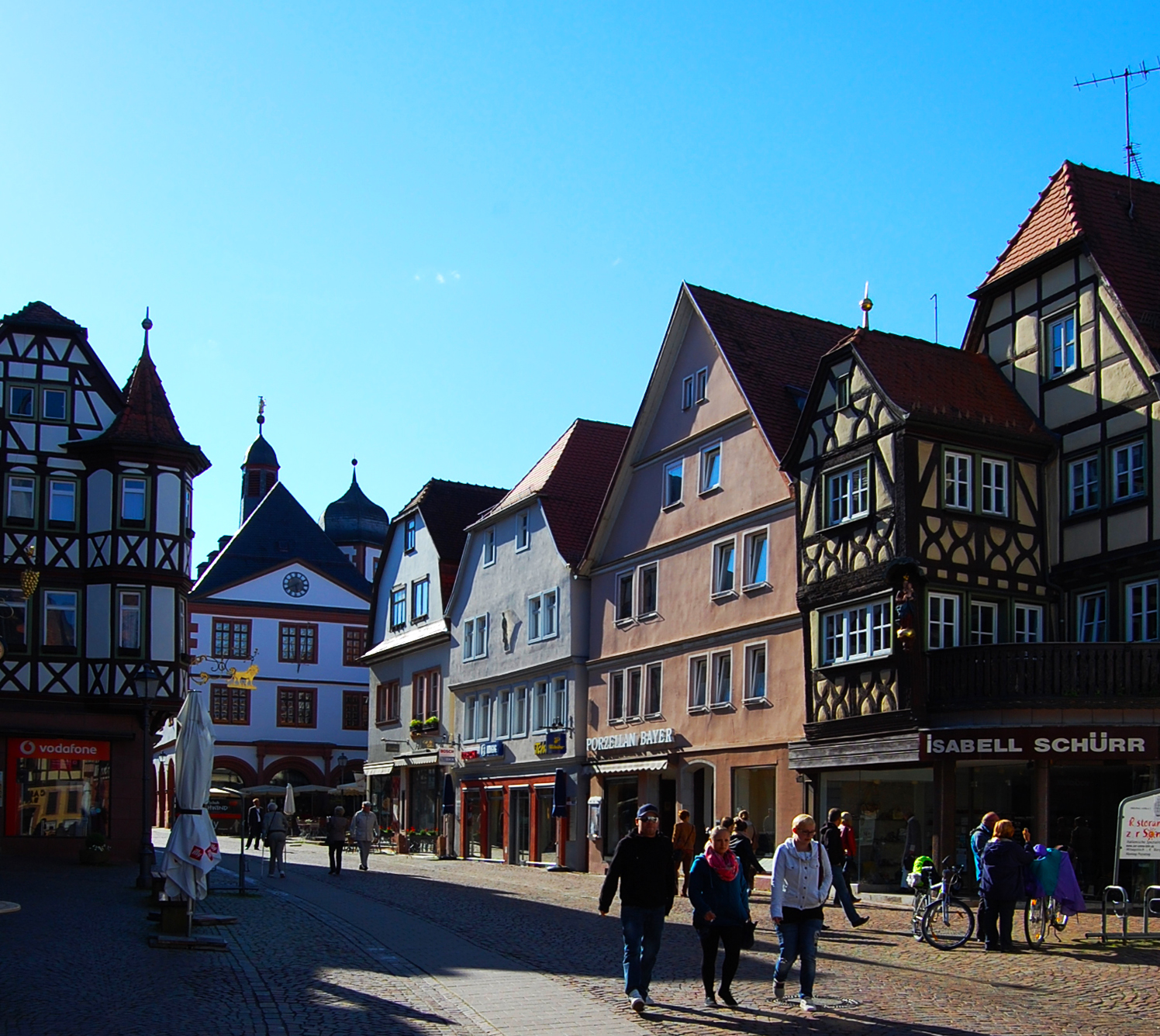 Strówka w Lohr am Main